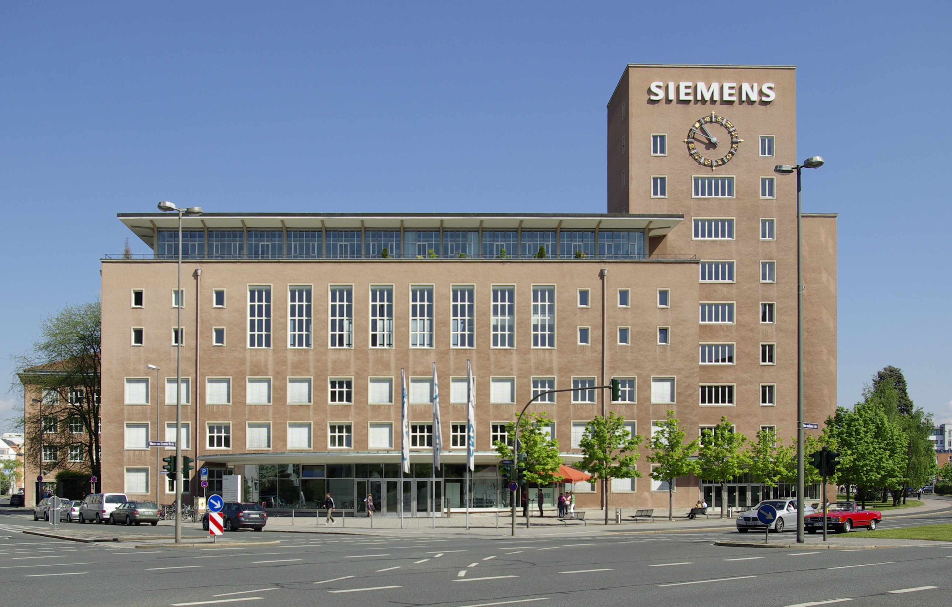 Das 1948 bis 1953 erbaute Verwaltungsgebäude der Siemens-Schuckertwerke (seit 1966 Siemens AG) in der Werner-von-Siemens-Straße 50 in Erlangen, Architekt: Hans Hertlein.